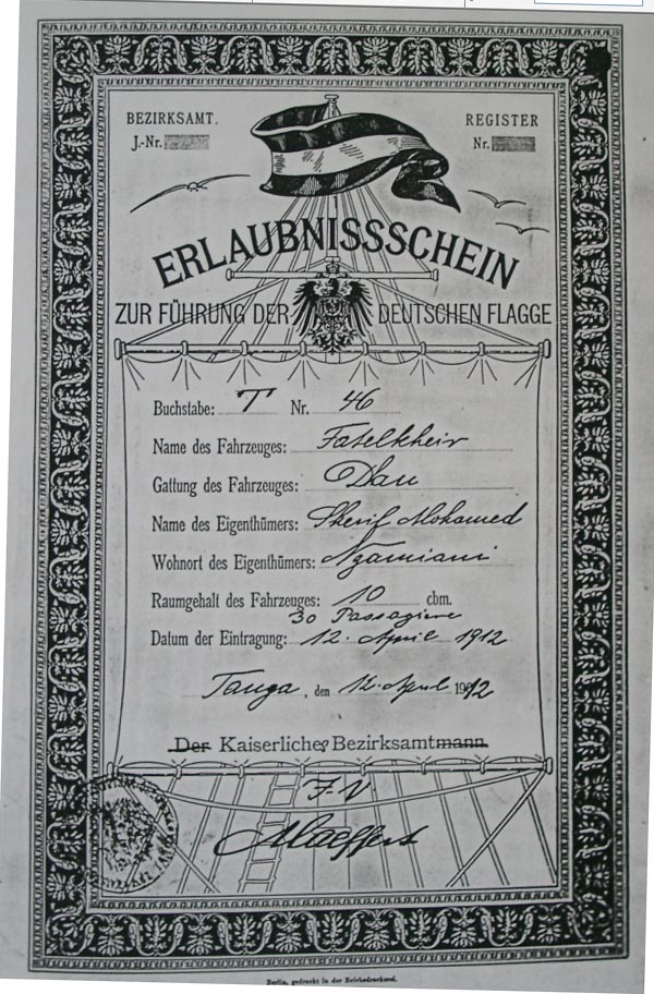 Erlaubnisschein zur Führung der Deutschen Flagge in den Kolonien, 1912